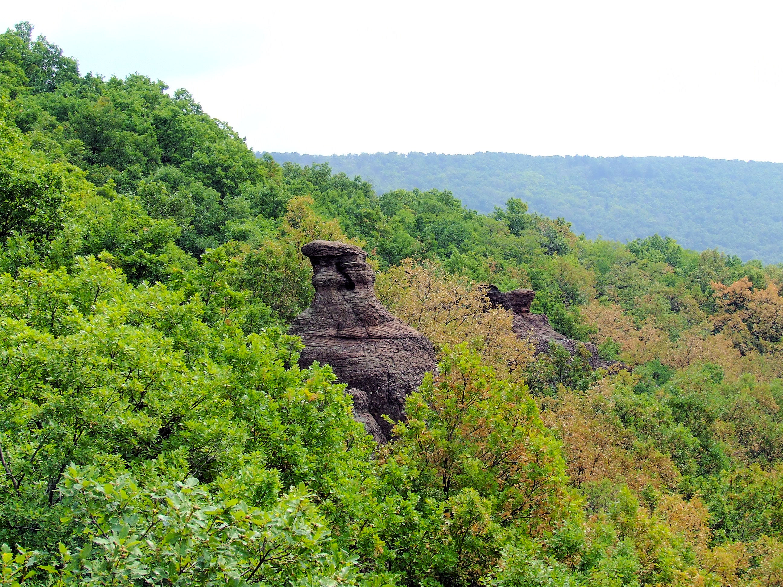 A Jakab-hegyi Babbás (Babás) szerkövek